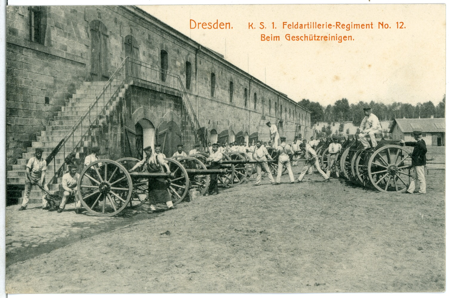 Dresden; Kaserne der Feldartillerie-Regiments This postcard is from publisher Brück & Sohn in Meißen ( This postcard has a unique number 01557 and is available in a higher resolution at the publisher. This images was uploaded in a cooperation project between Wikipedians and the publisher.